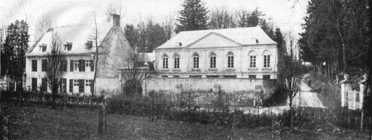 Foto van 'landhuis Aalbeek'. Datum is onbekend, maar moet voor 1896 gemaakt zijn omdat het hoofdgebouw (links) toen is afgebroken.